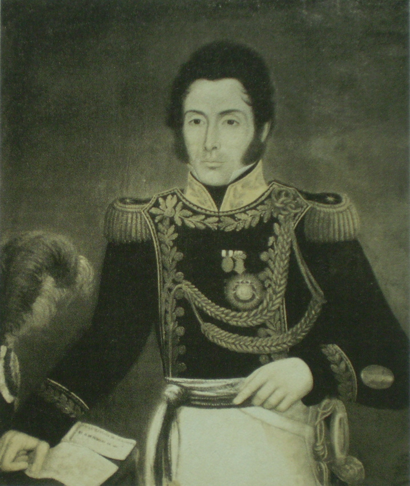 Miguel estanislao Soler. Óleo de Bettinoti. MHN